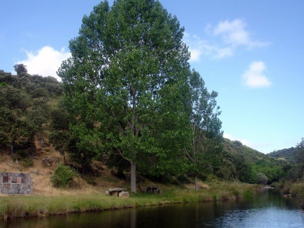 Ribera que pasa por Castro de Alcañices y desemboca en el río Duero.